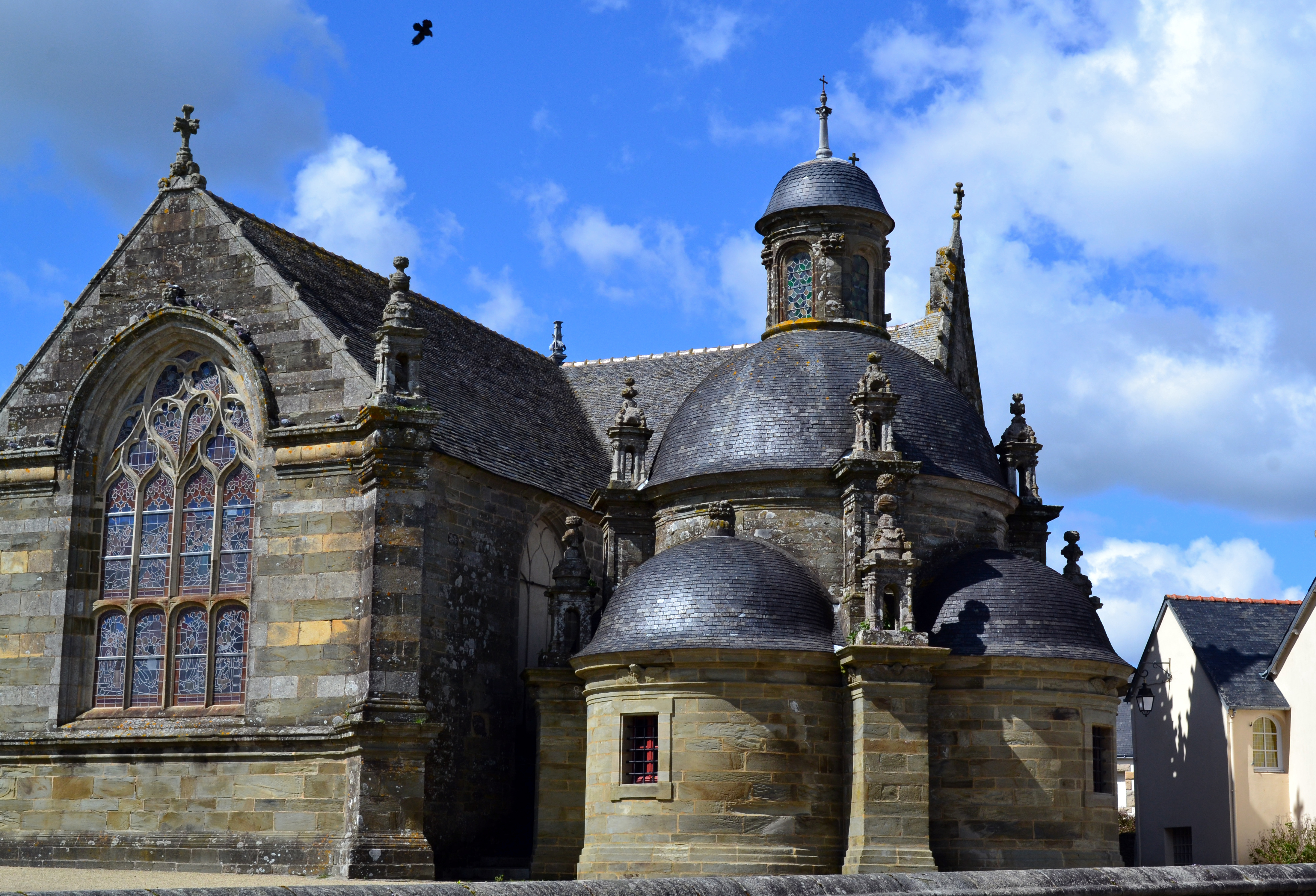 Eglise Saint-Germain de Pleyben, Finistère, Bretagne